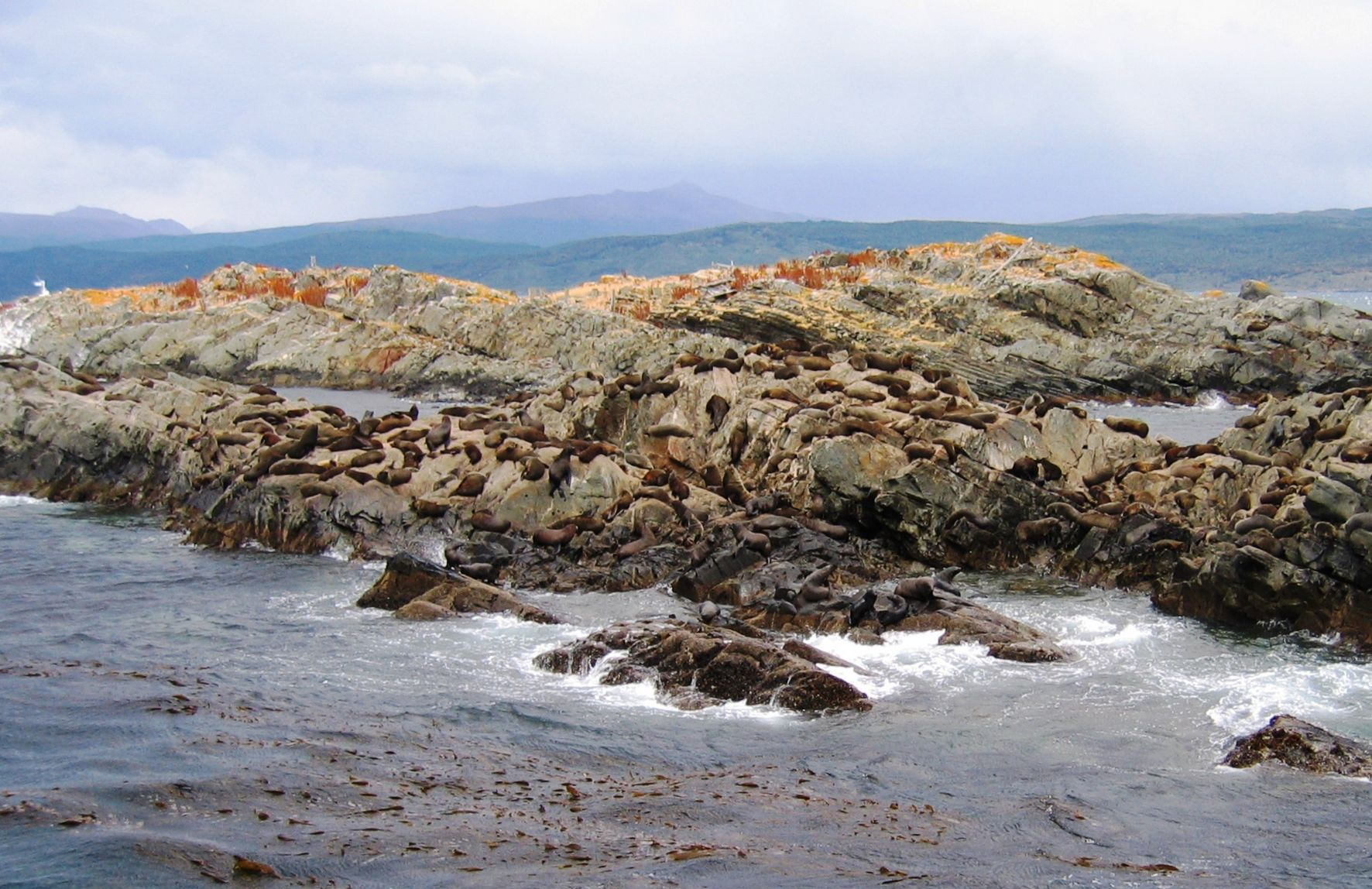 Canal de Beagle - Illa lleons marins